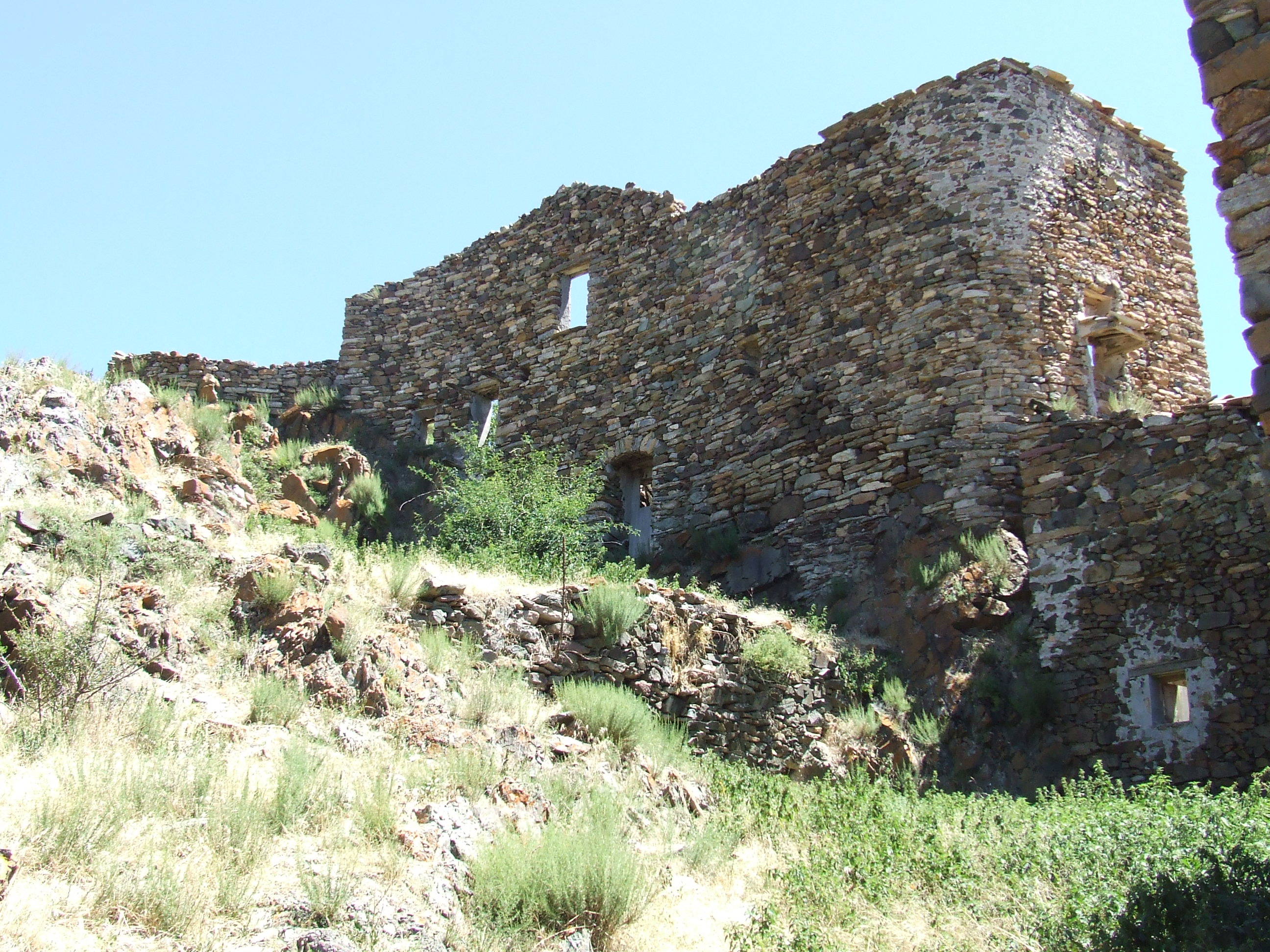 El castell d'Erill, a Erillcastell (Malpàs, el Pont de Suert, Alta Ribagorça)